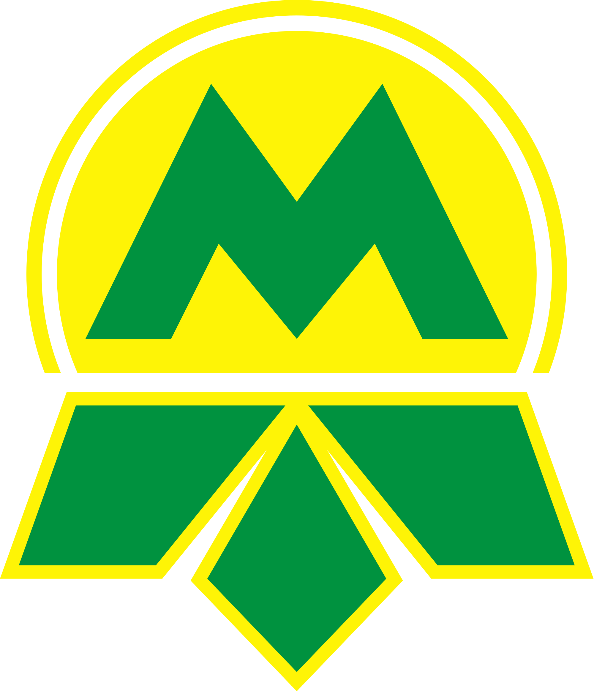 Official Logo